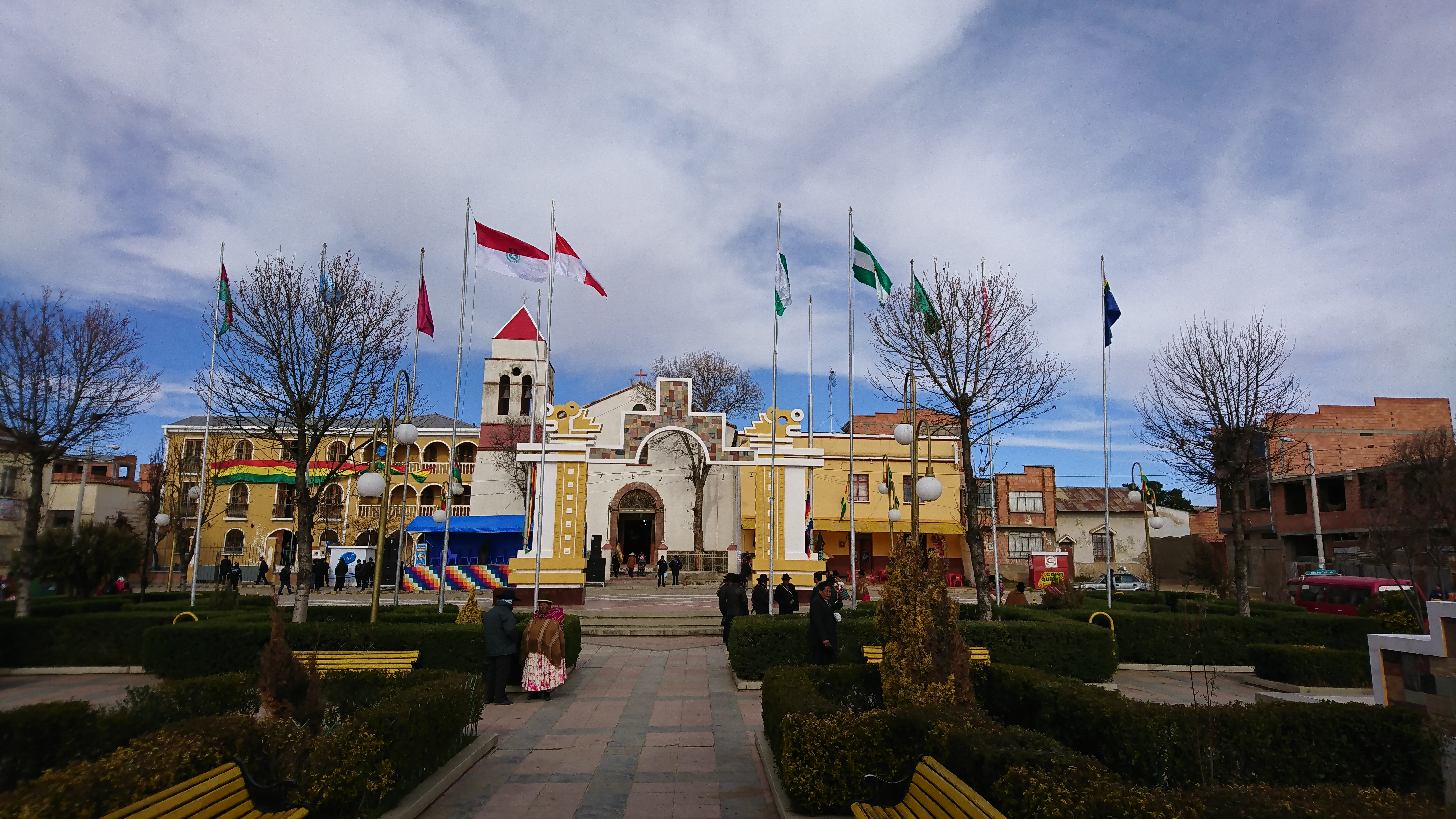 Plaza Principal de Pucarani, 6 de agosto